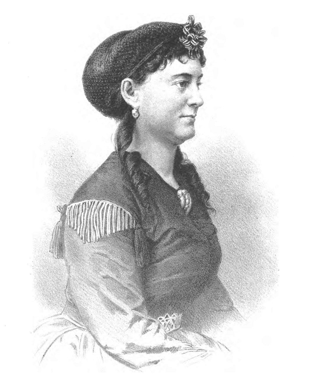 Zelma Hedin (1827-1874)